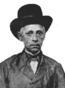 Foto de Arruda Câmara (1752-1810)